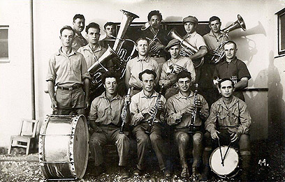 ראשוני התזמורת: מלפנים ומימין: חיים בינון, יעקב בולשין, שמואל מרגון, דוד פרידמן, המאירי, בצלאל צורי, הלל גולני, שמעון (המנצח), אהרון לויב, משה הורביץ, שבתאי בלוך, דוד יזהר, חונקה חייט, מרדכי שמחוני.